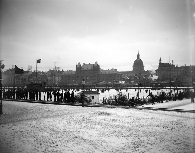 Skridskobanan vid Nybroviken, Norra Blasieholmshamnen. I bakgrunden Hedvig Eleonora kyrka Foto Nyckelord Plats: Norra Blasieholmshamnen. Strandvägen. Norrmalm. Östermalm. Tid: 29 februari 1896 Ämne: Vinter. Skridskoåkning. Referenser Upphov: Okänd. Tid: 29 februari 1896 Beteckning: Fotonummer C 1285